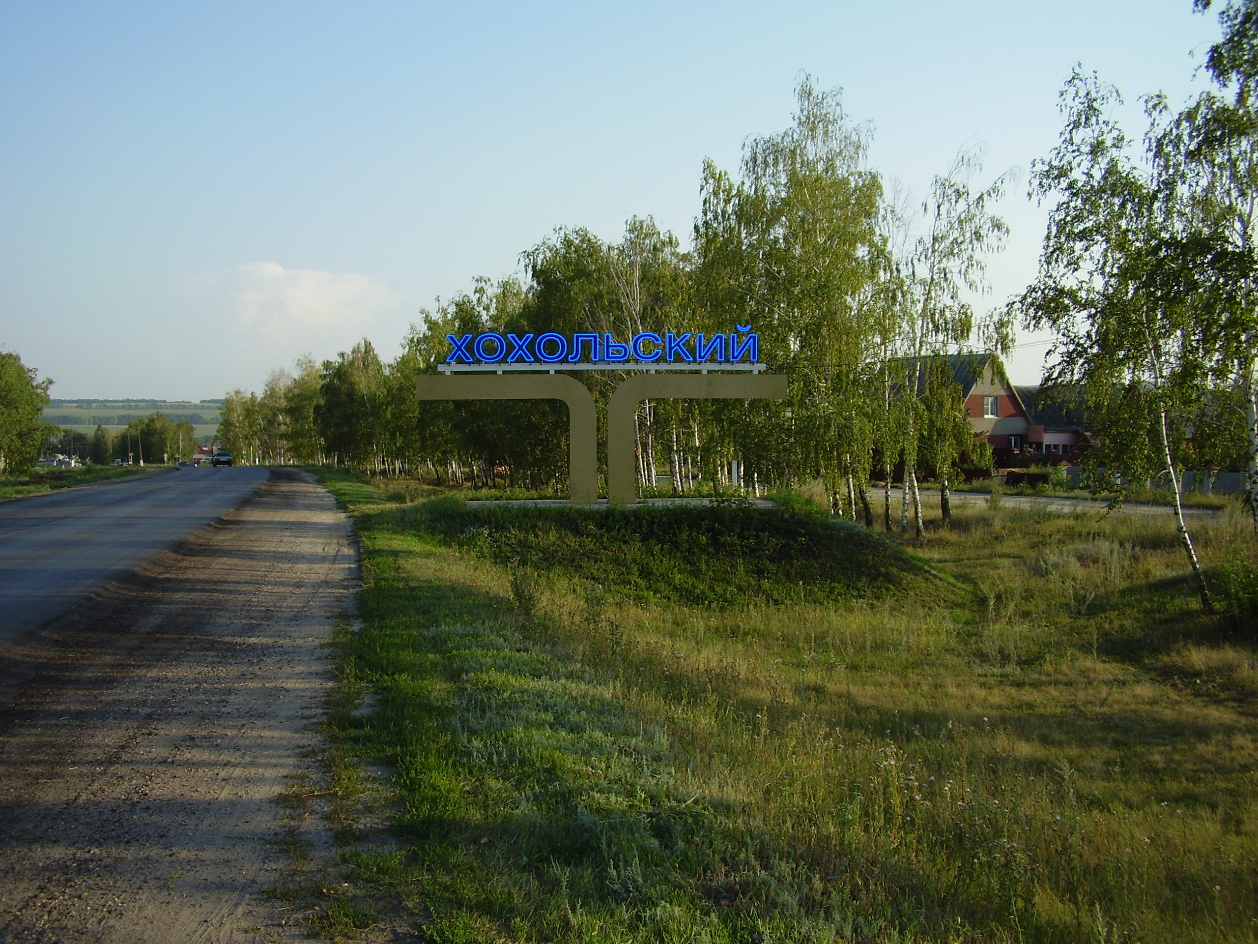 Въезд в п.Хохольский со стороны трассы Воронеж--Курск